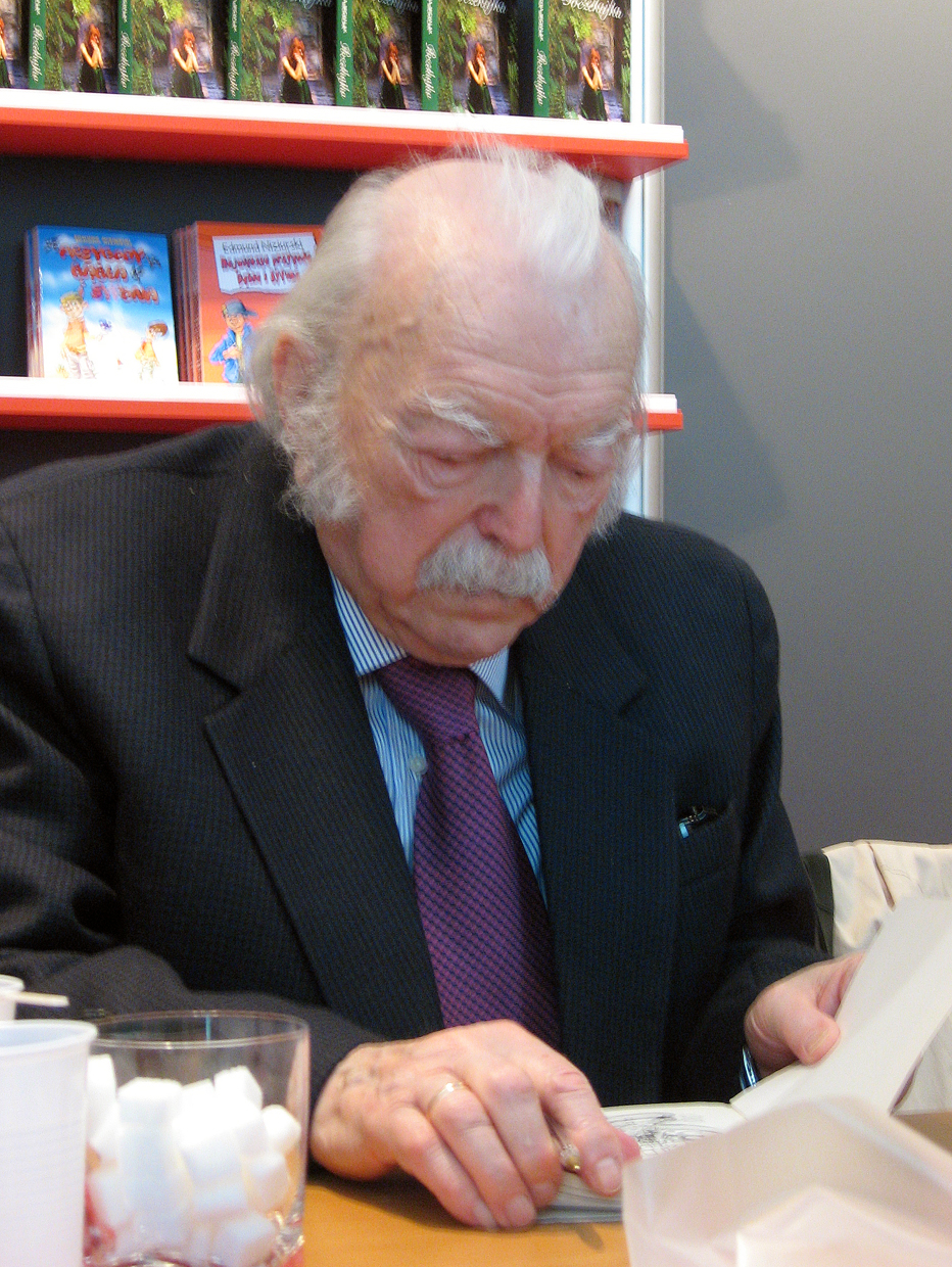 53. Międzynarodowe Targi Książki w Warszawie - Edmund Niziurski podpisuje swoje książki (2008-05-17).